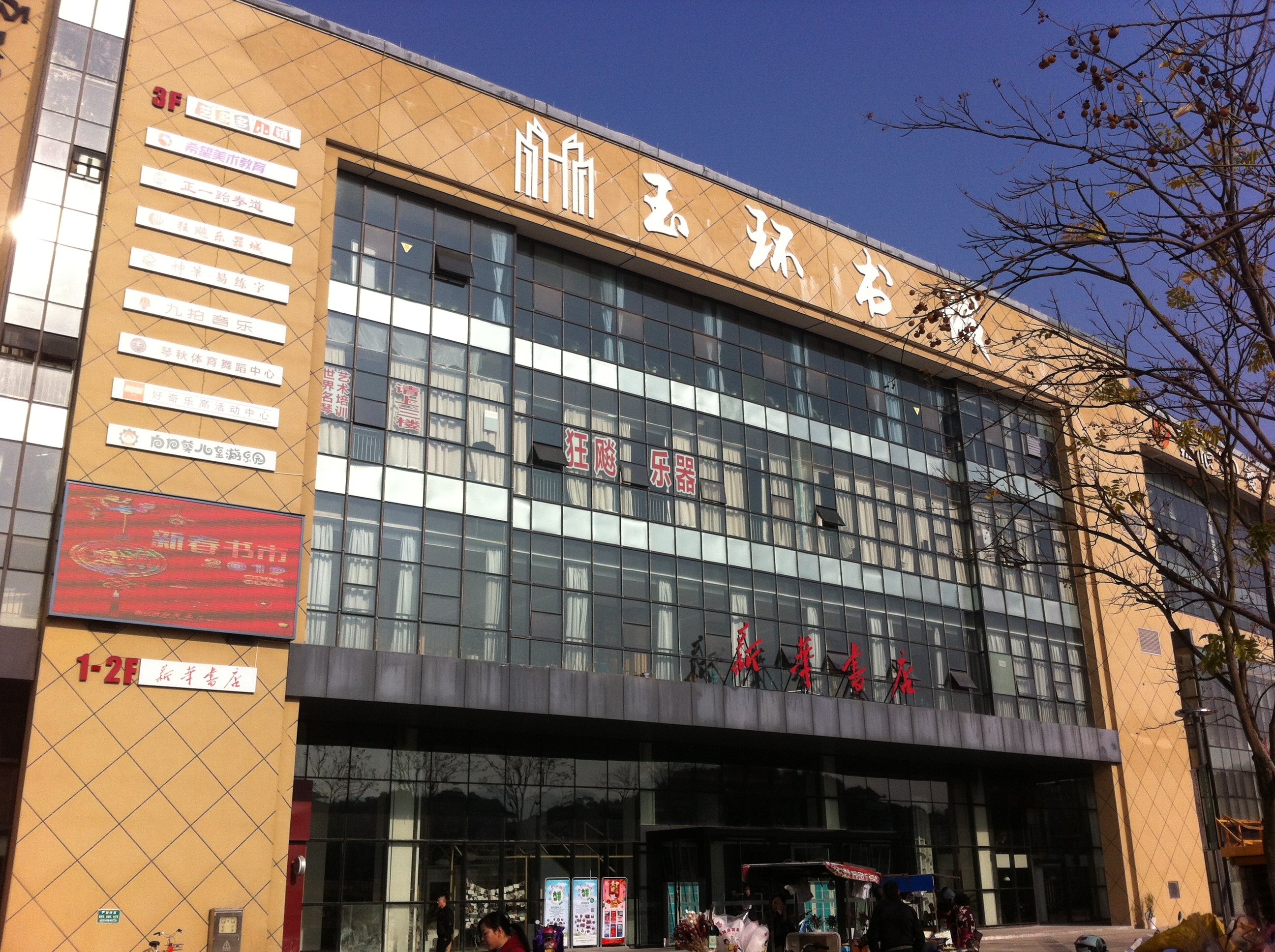 中文（中国大陆）: 玉环书城外部大楼